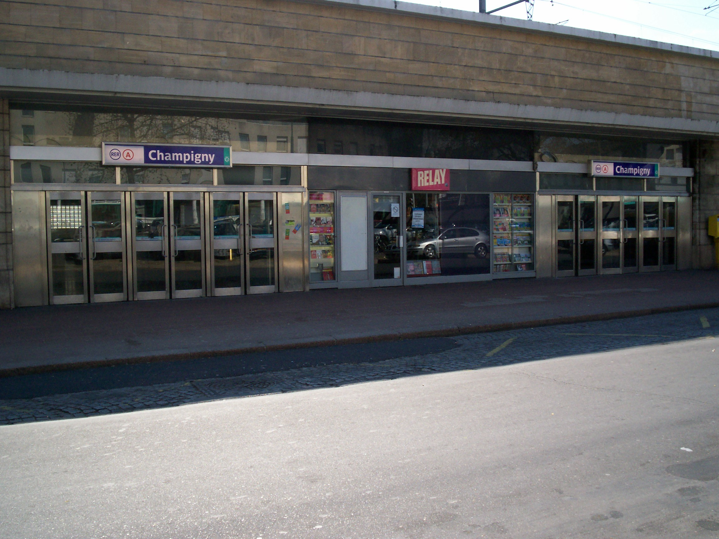 Gare de Champigny